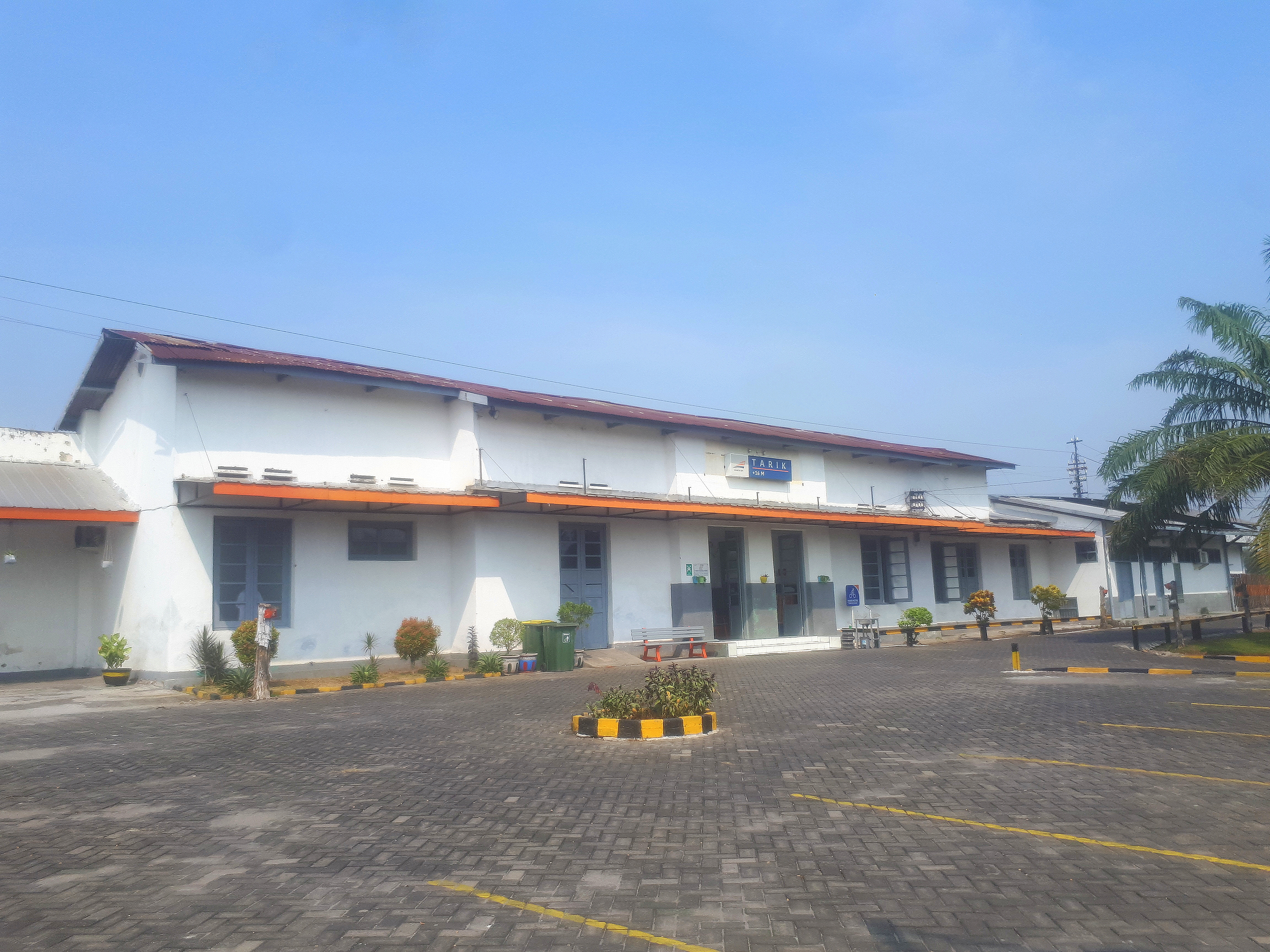 Tampak depan Stasiun Tarik, 2020